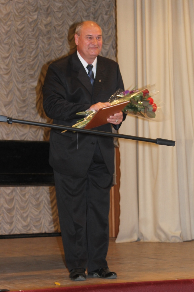 Микола Коваль, народний артист України